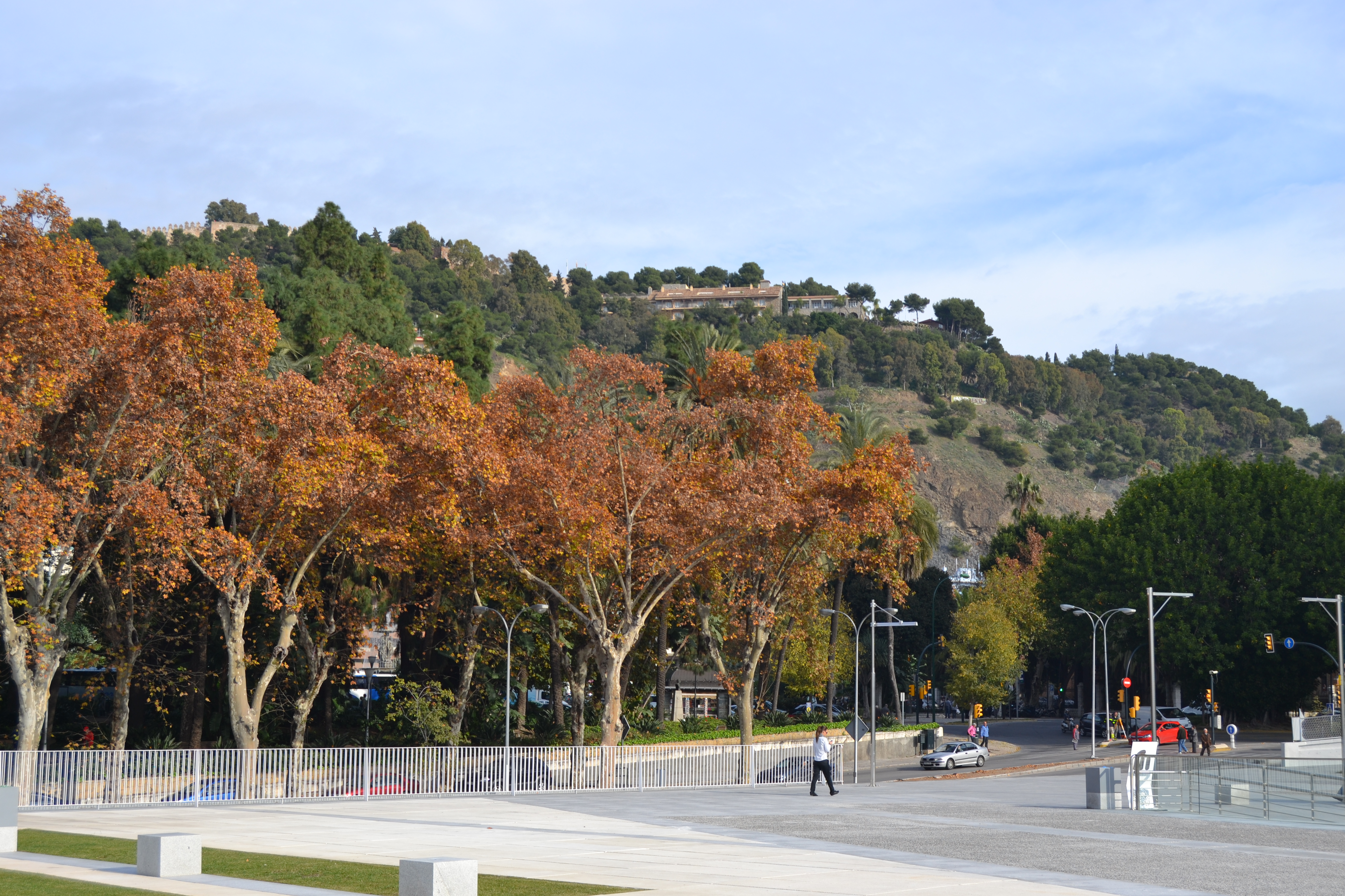 Paseo de los Curas, Málaga, España